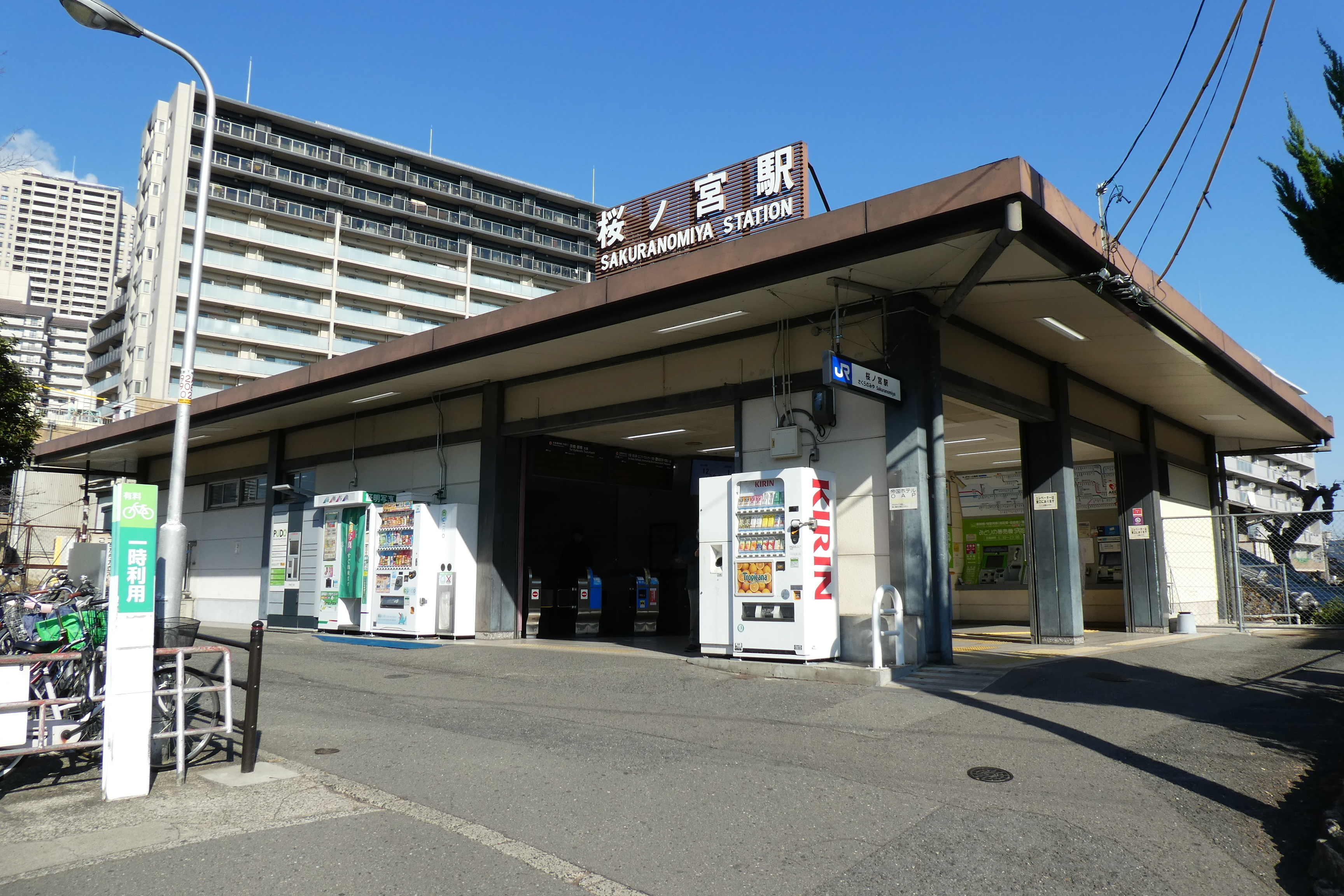 大阪環状線 桜ノ宮駅 西口